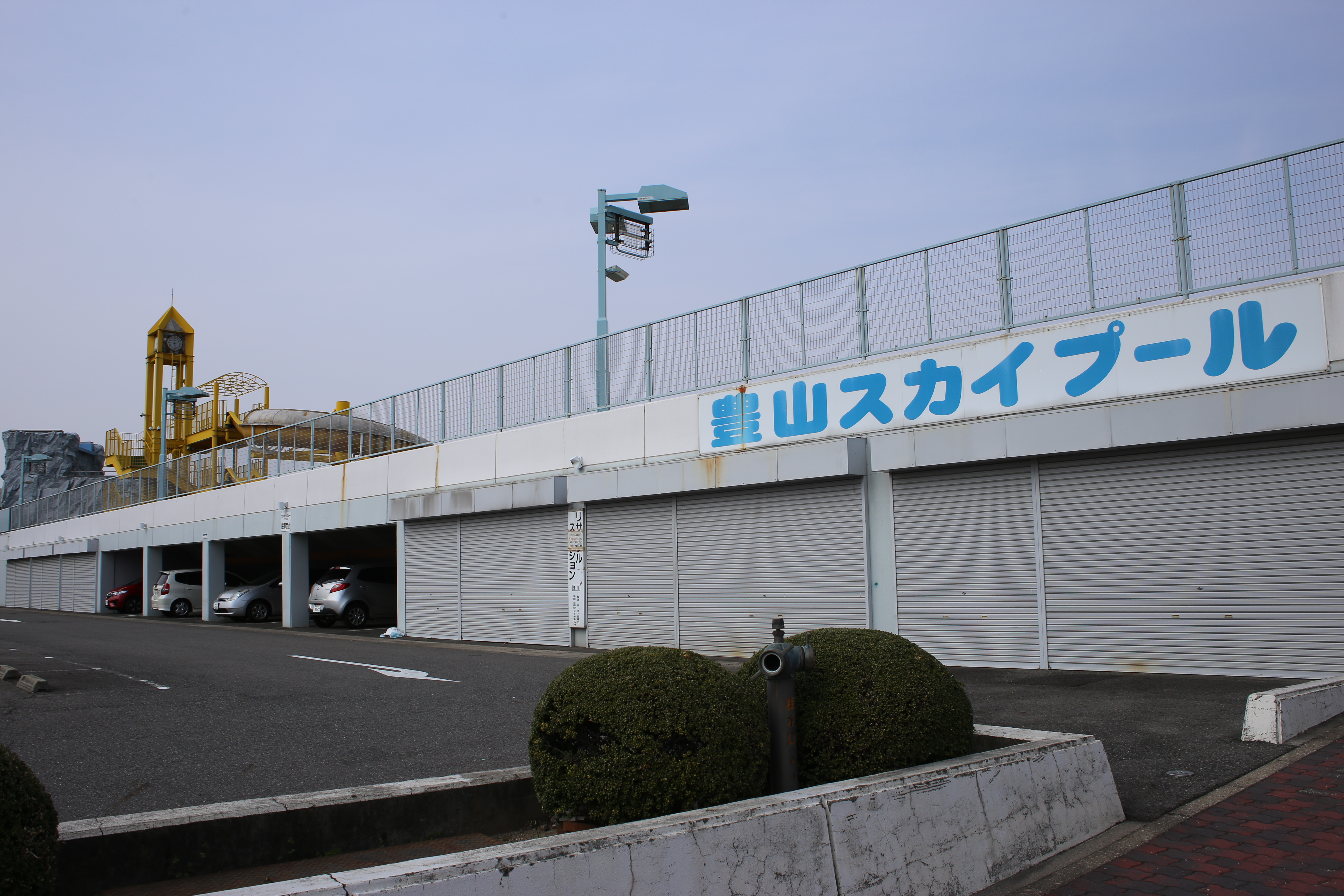 愛知県西春日井郡豊山町の豊山スカイプール